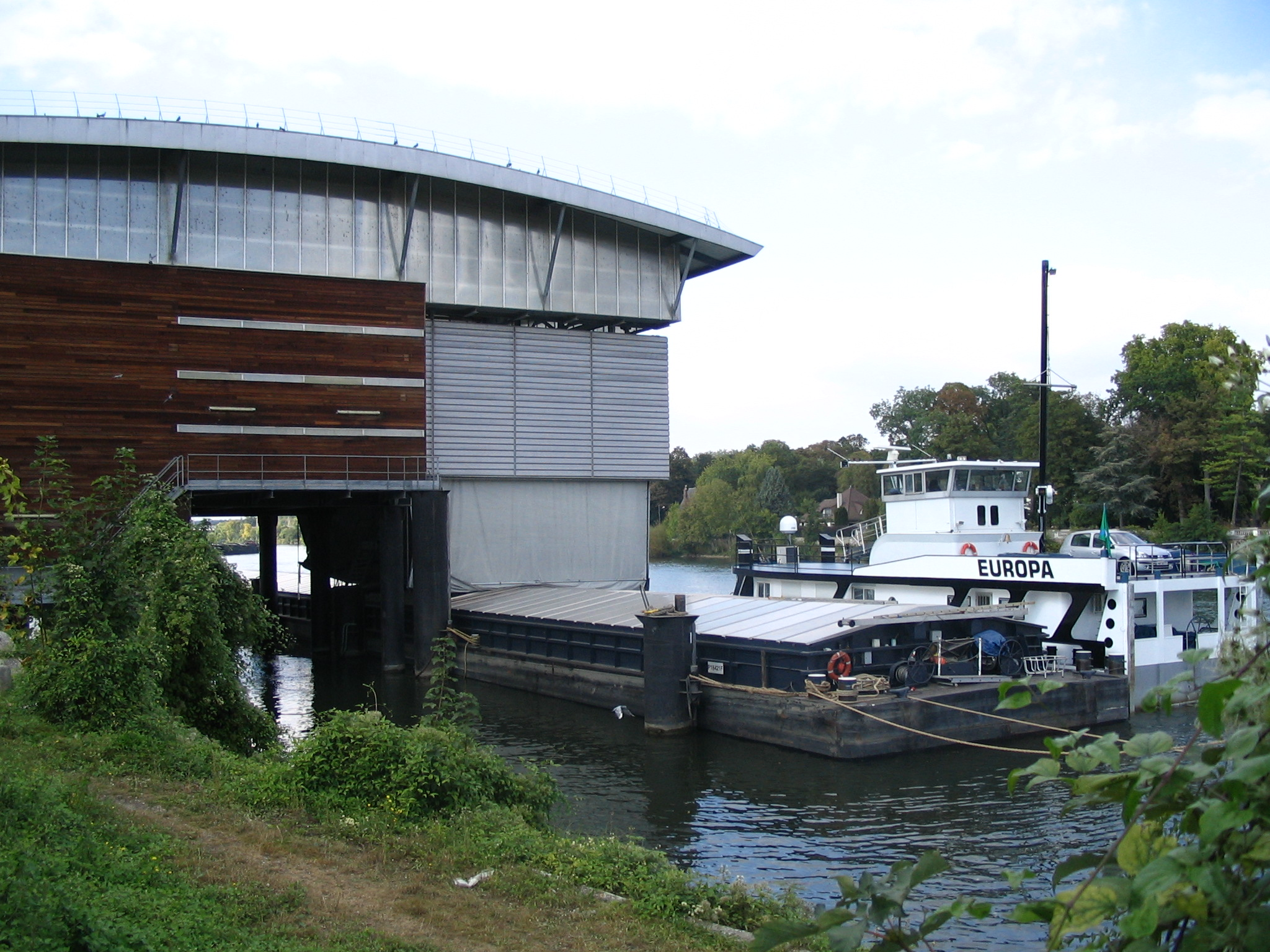 Grands moulins de Corbeil - Architecte Paul Friesé 1893 - Corbeil-Essonnes, France